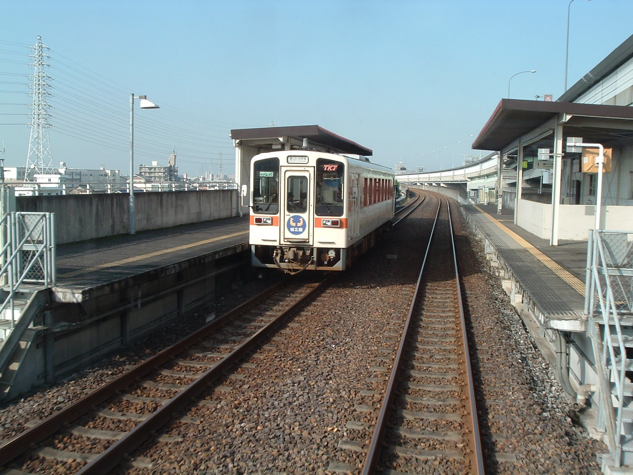 東海交通事業城北線の比良駅